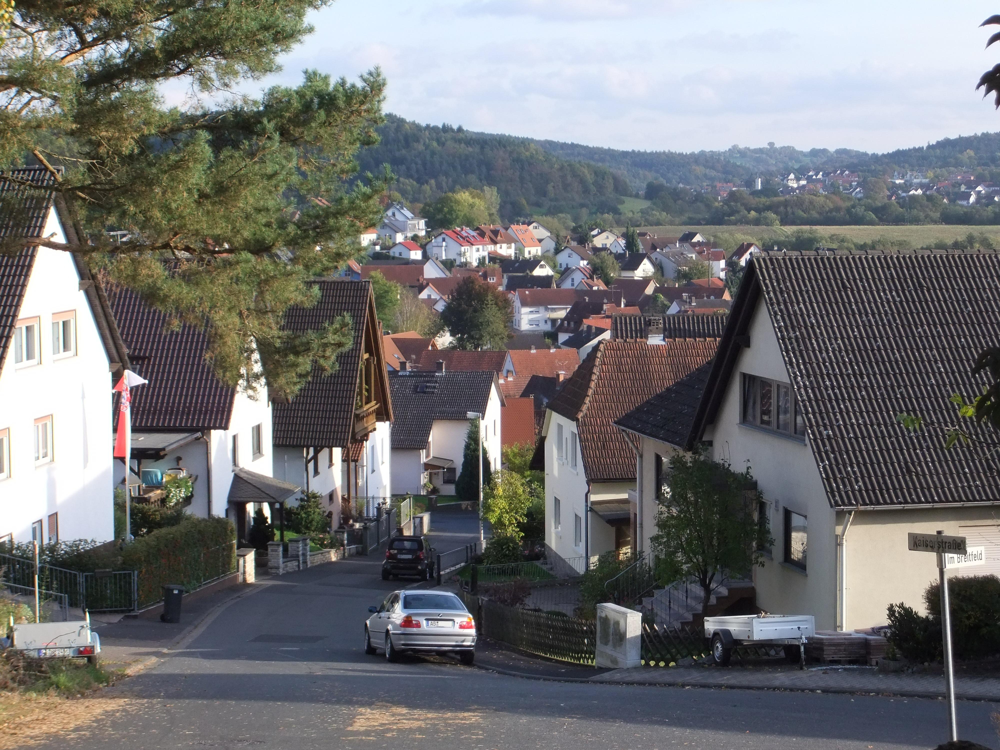 In Mensengesäß (im Hintergrund Schimborn)